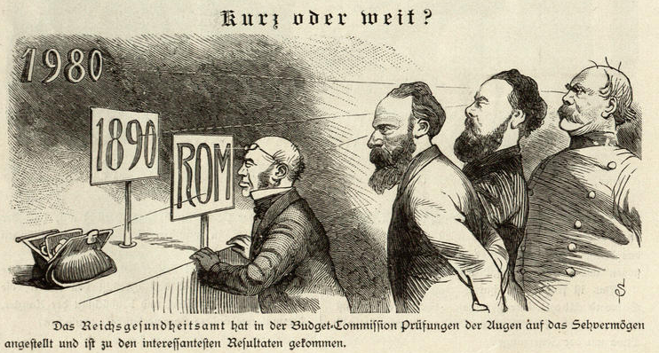 Karikatur „Kurz oder weit?“ aus dem Kladderadatsch, 1884. Die Bildunterschrift lautet: „Das Reichsgesundheitsamt hat in der Budget-Commission Prüfungen der Augen auf das Sehvermögen angestellt und ist zu den interessantesten Resultaten gekommen.“ (Windthorst sieht nur Rom, Bamberger hat den Geldbeutel im Auge, Richter die nächsten Wahlen; aber der Blick Bismarcks reicht ein Jahrhundert weiter.)